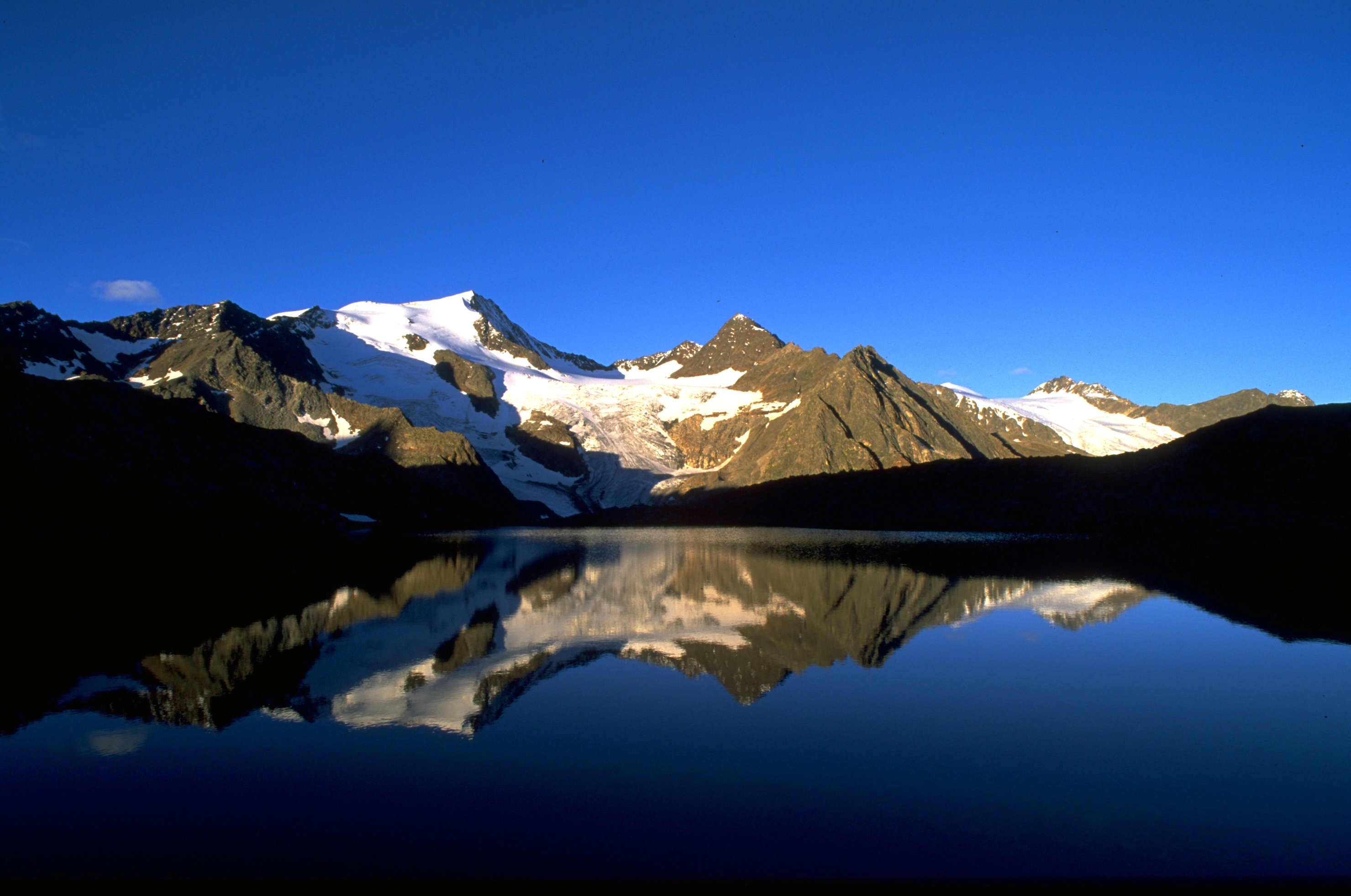 Oberer Grünausee (2328m) in den Stubaier Alpen, dahinter der Wilde Freiger (3418m)